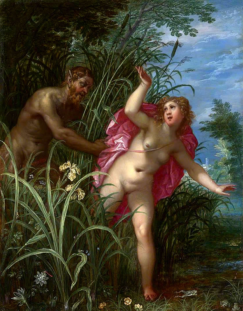 25 × 19.4 cm